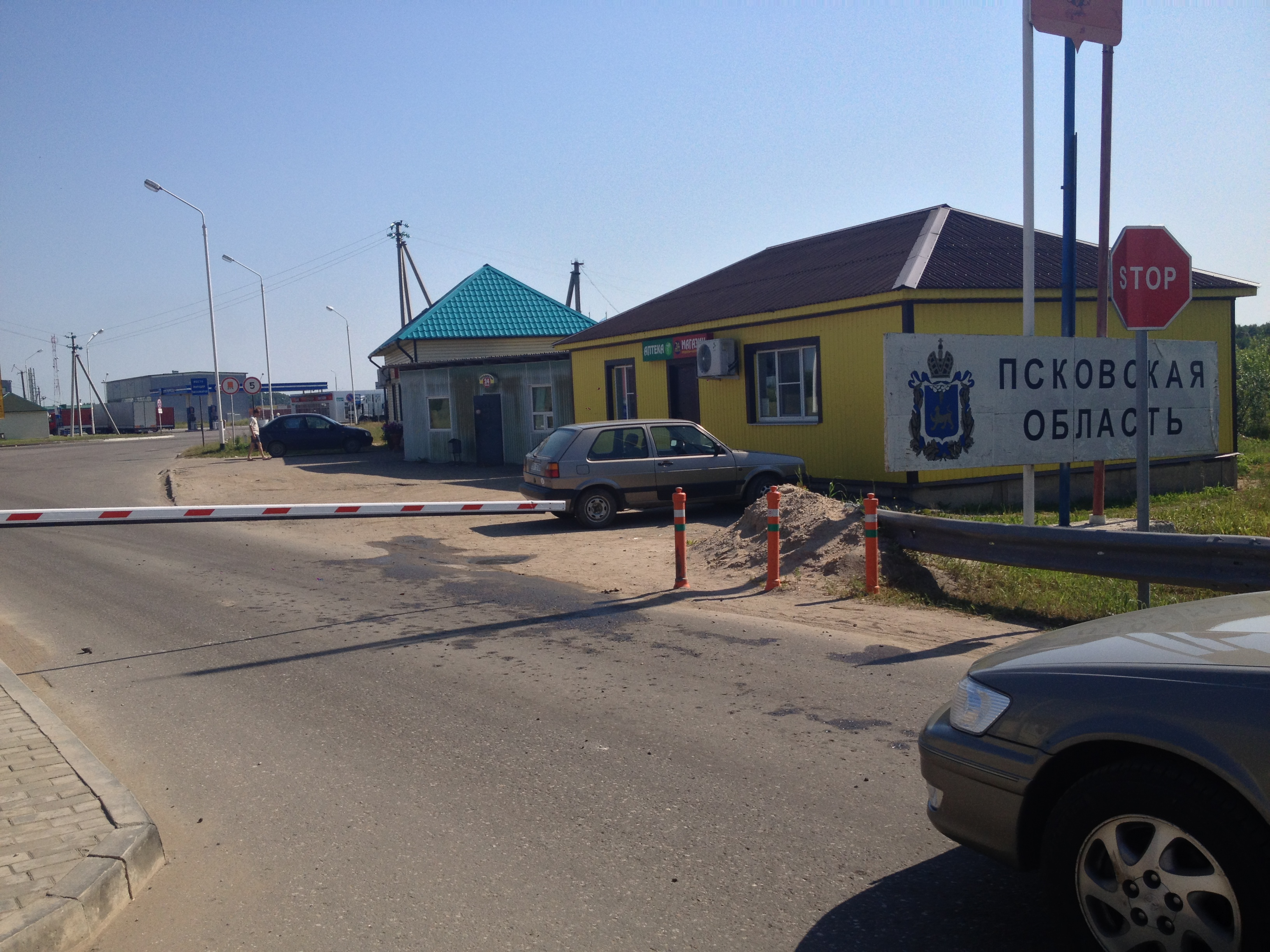 Pytalovsky District, Pskov Oblast, Russia